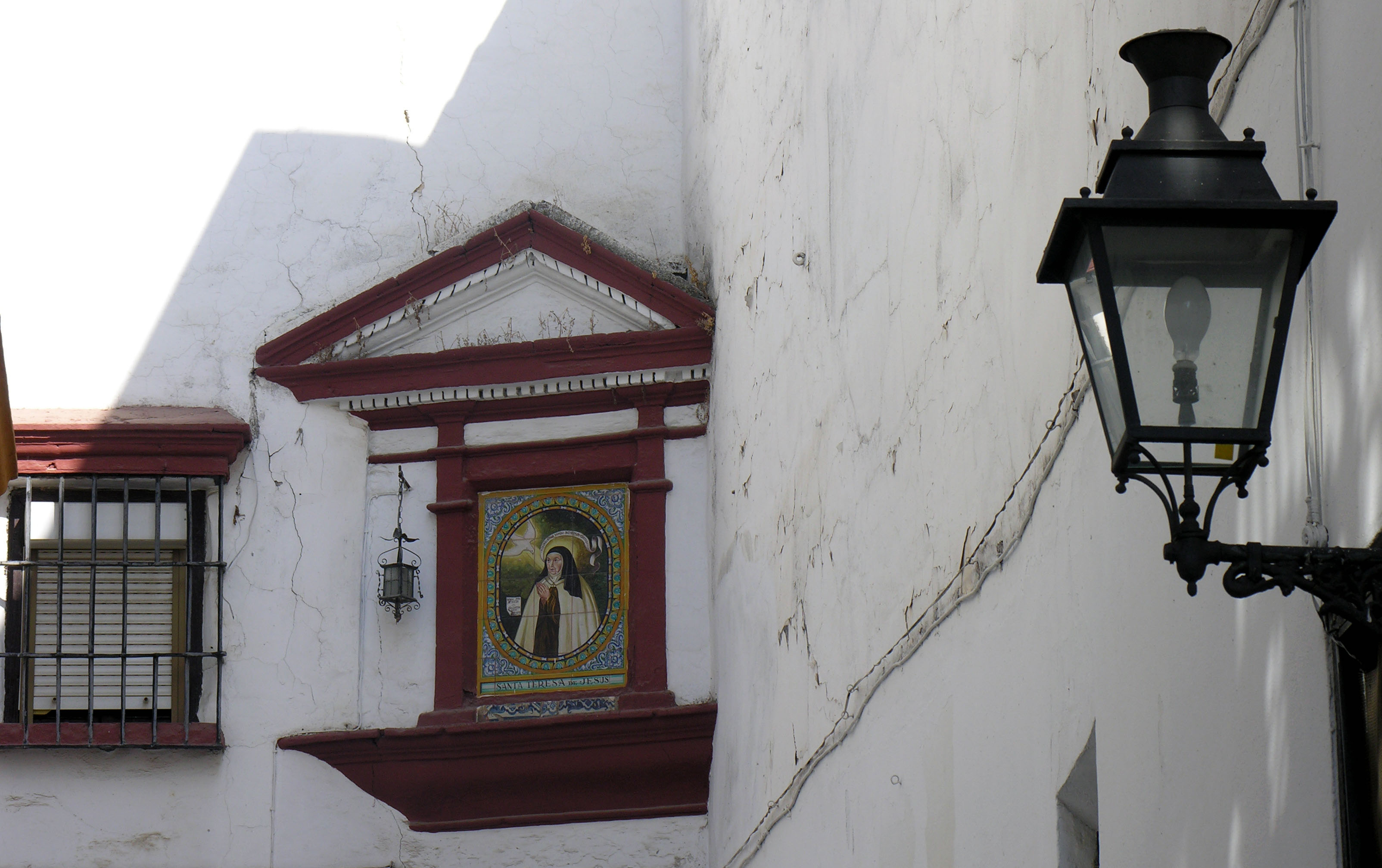 Detalle en una calle del barrio de Santa Cruz (Sevilla, Andalucía, España).